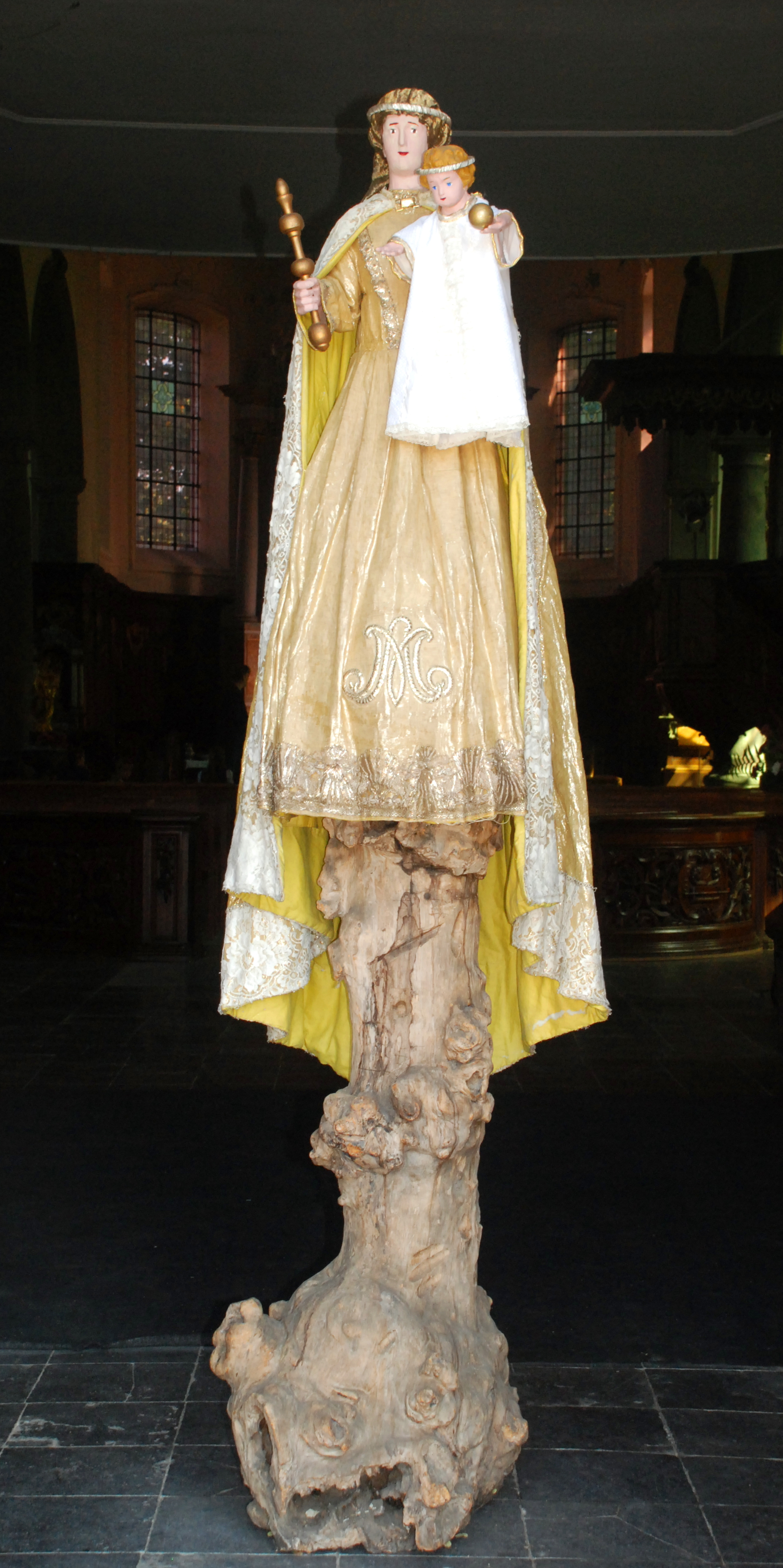 Belgique - Brabant wallon - Court-Saint-Étienne - Église Saint-Étienne - la Vierge en 2012